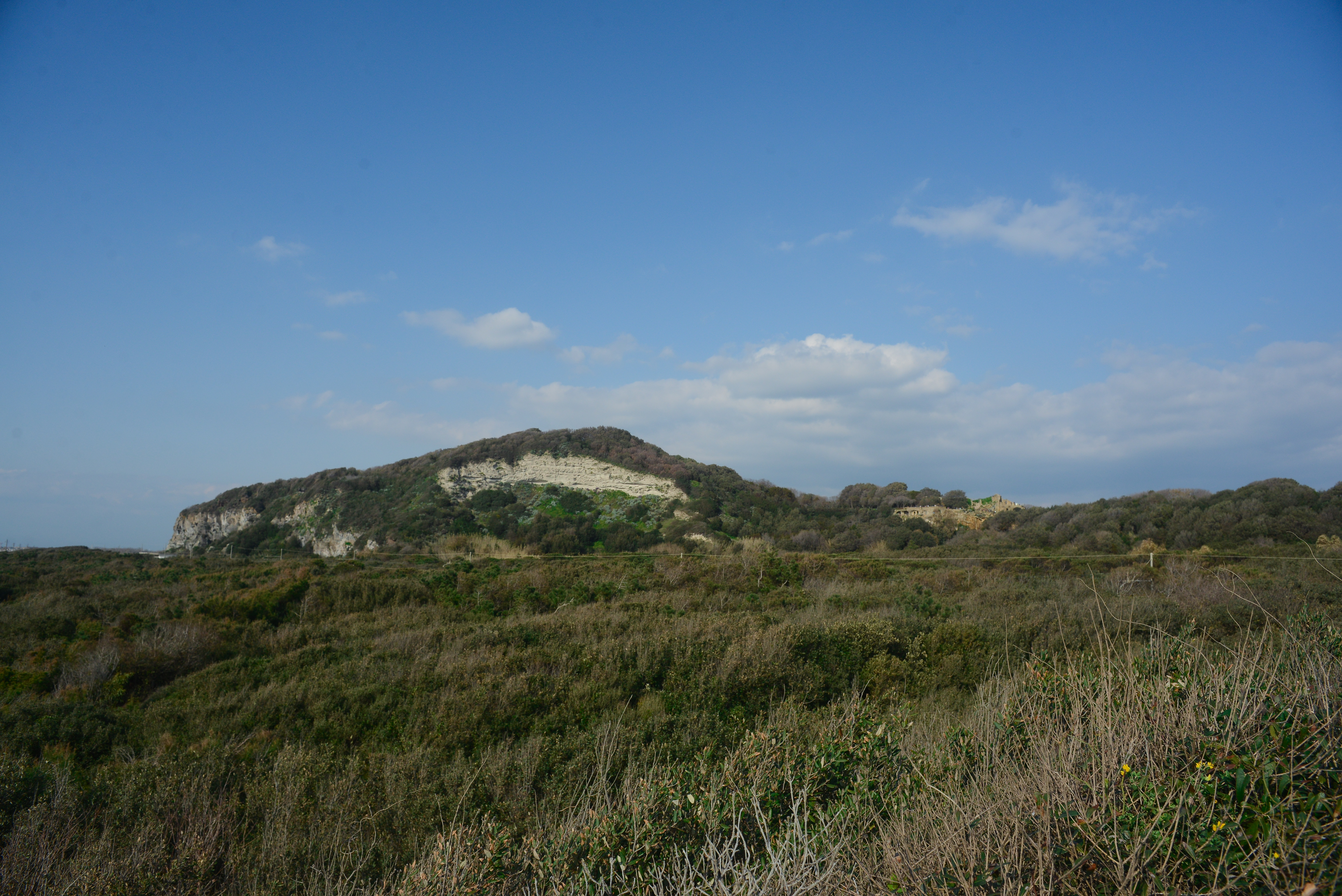 Acropoli di Cuma vista dal bosco